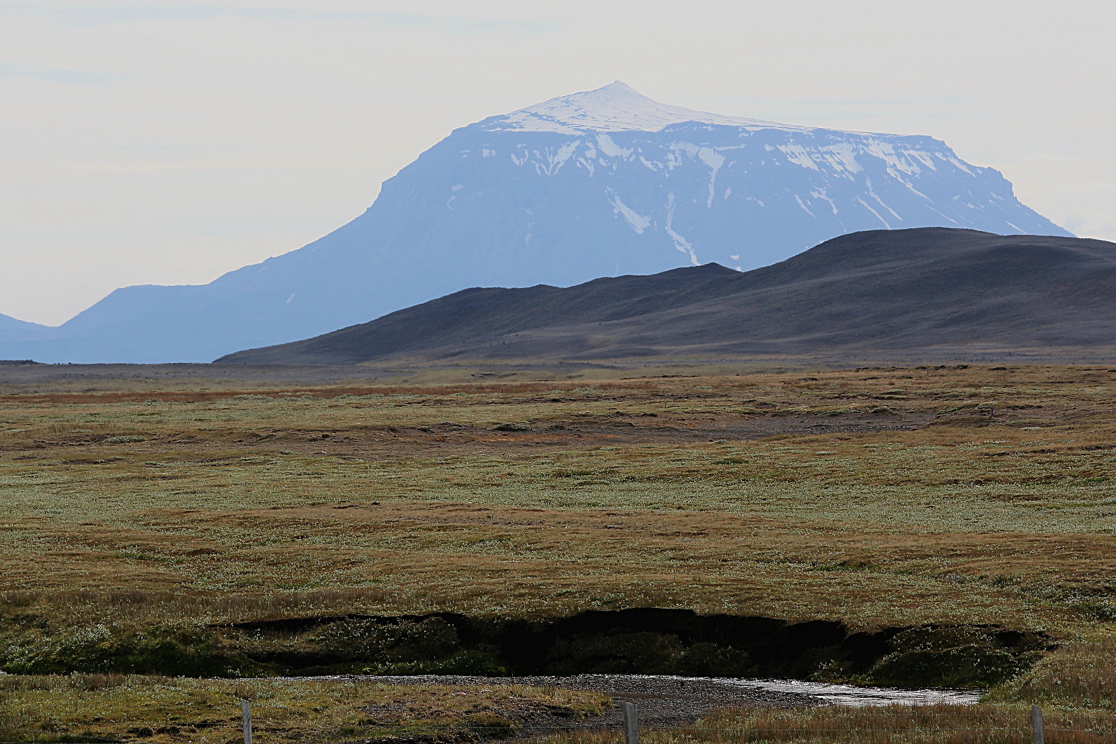 Blick von der Bauernsiedlung Möðrudalur auf den Berg Herðubreið